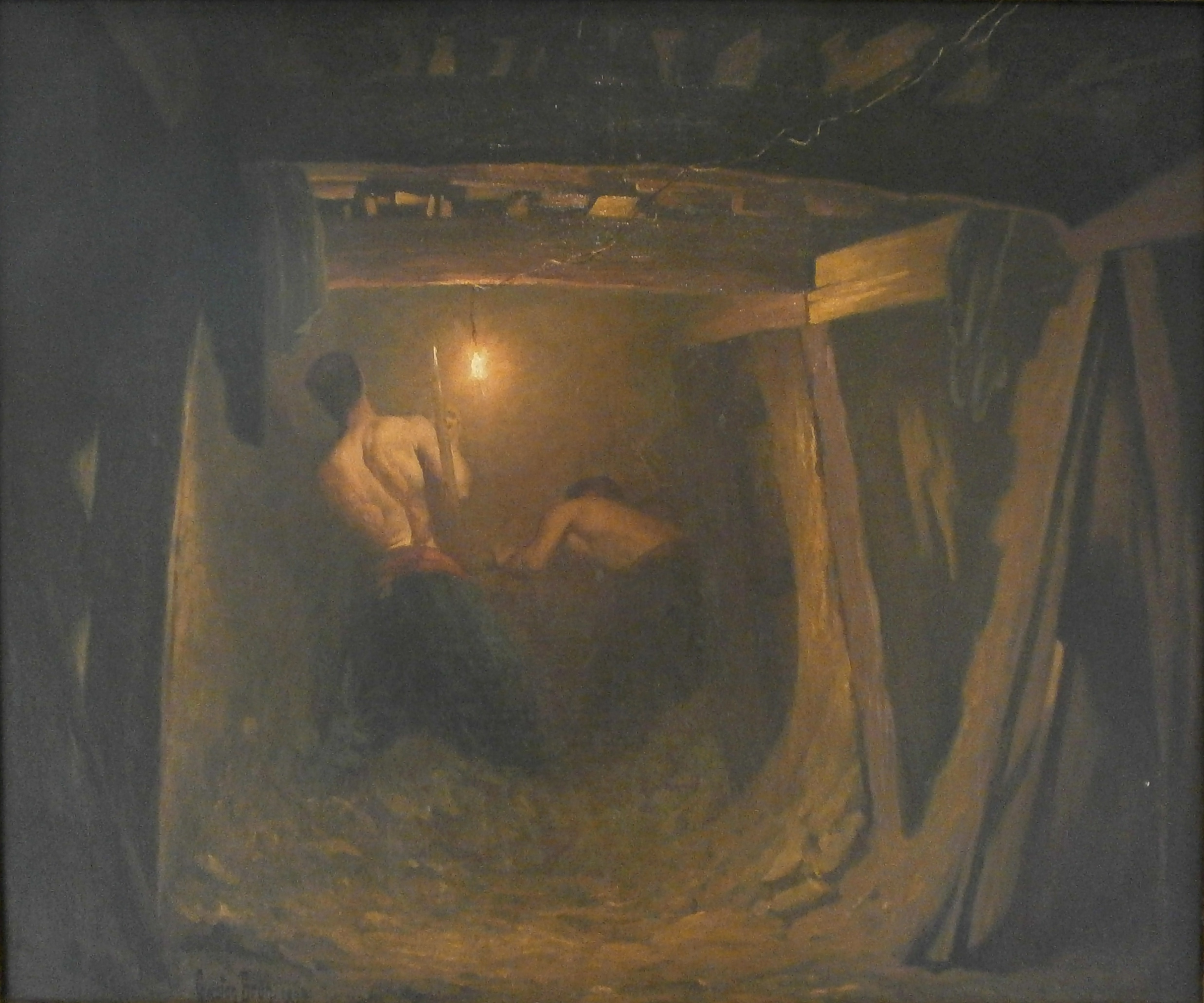 Ecole française